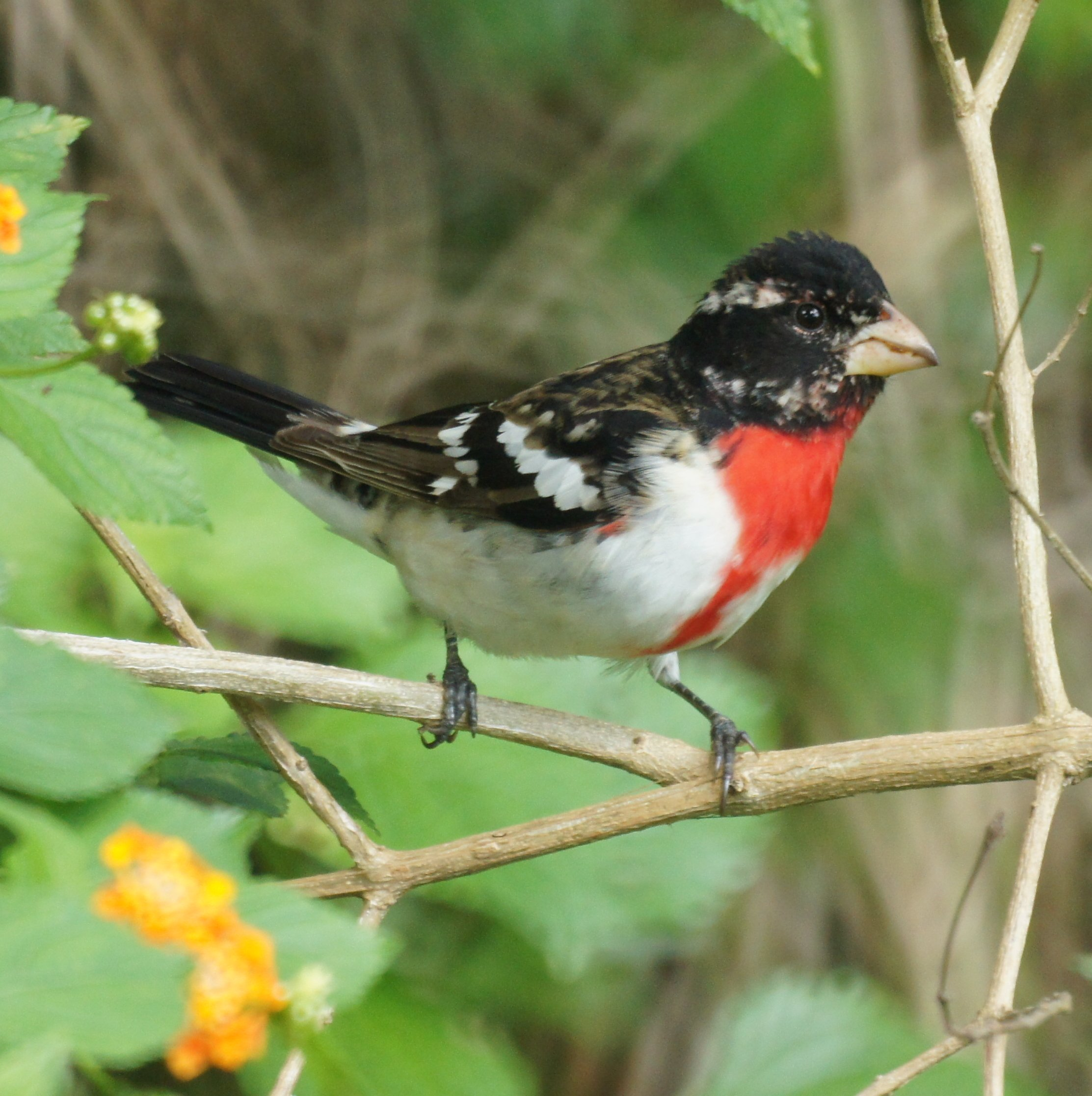 Dauphin Island Birds